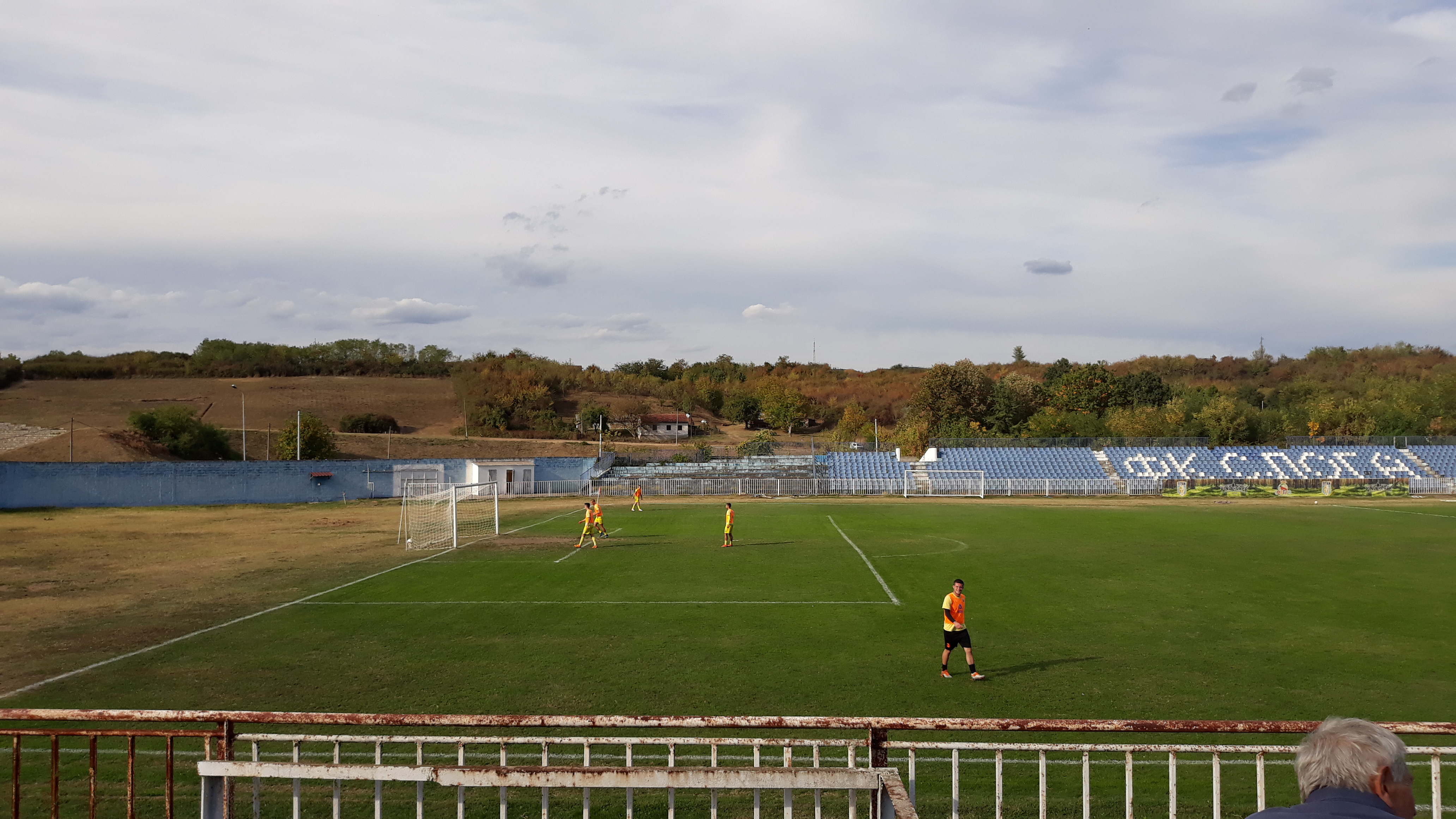 Фудбалска утакмица краљевачке Слоге и Јошанице из Новог Пазара, одиграна на Градском стадиону у Краљеву, 28. септембра 2019. године, у оквиру деветог кола Српске лиге Запад за сезону 2019/20.